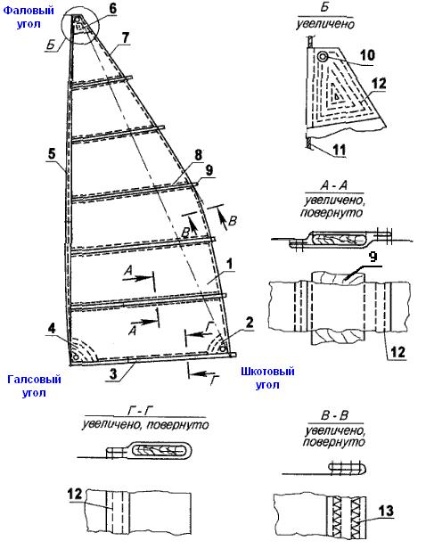 Эскиз паруса с указанием его конструктивных элементов